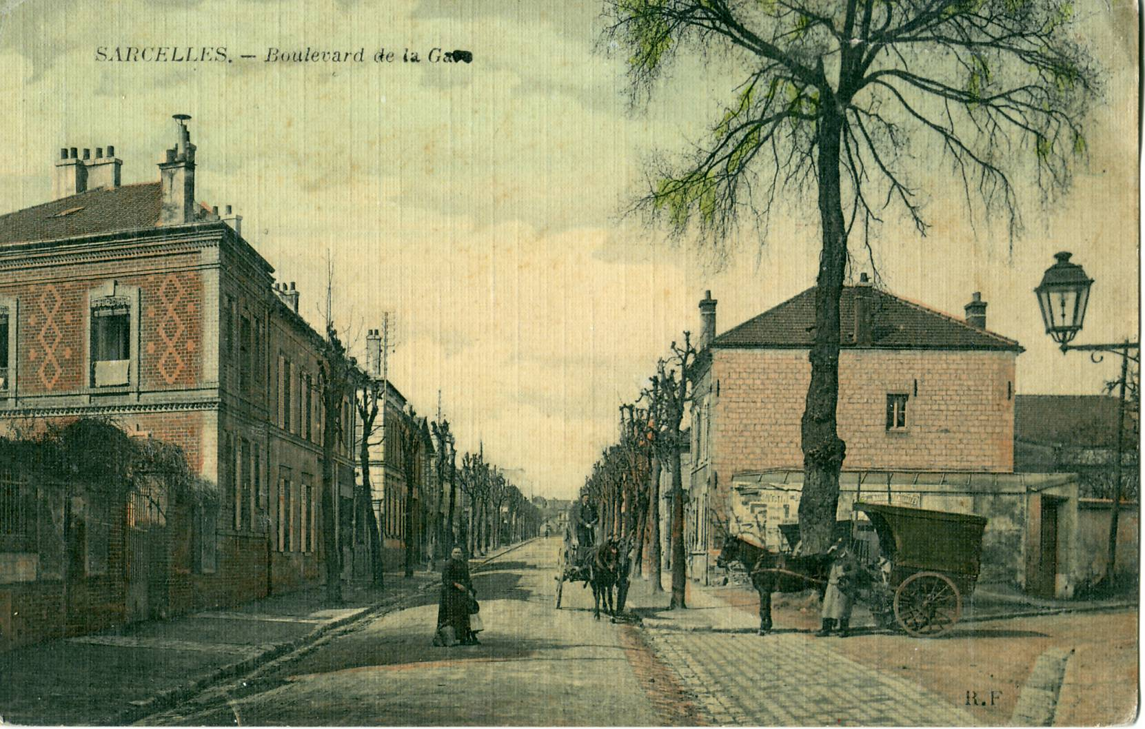 Carte postale ancienne éditée par R.F :SARCELLES - Boulevard de la Gare